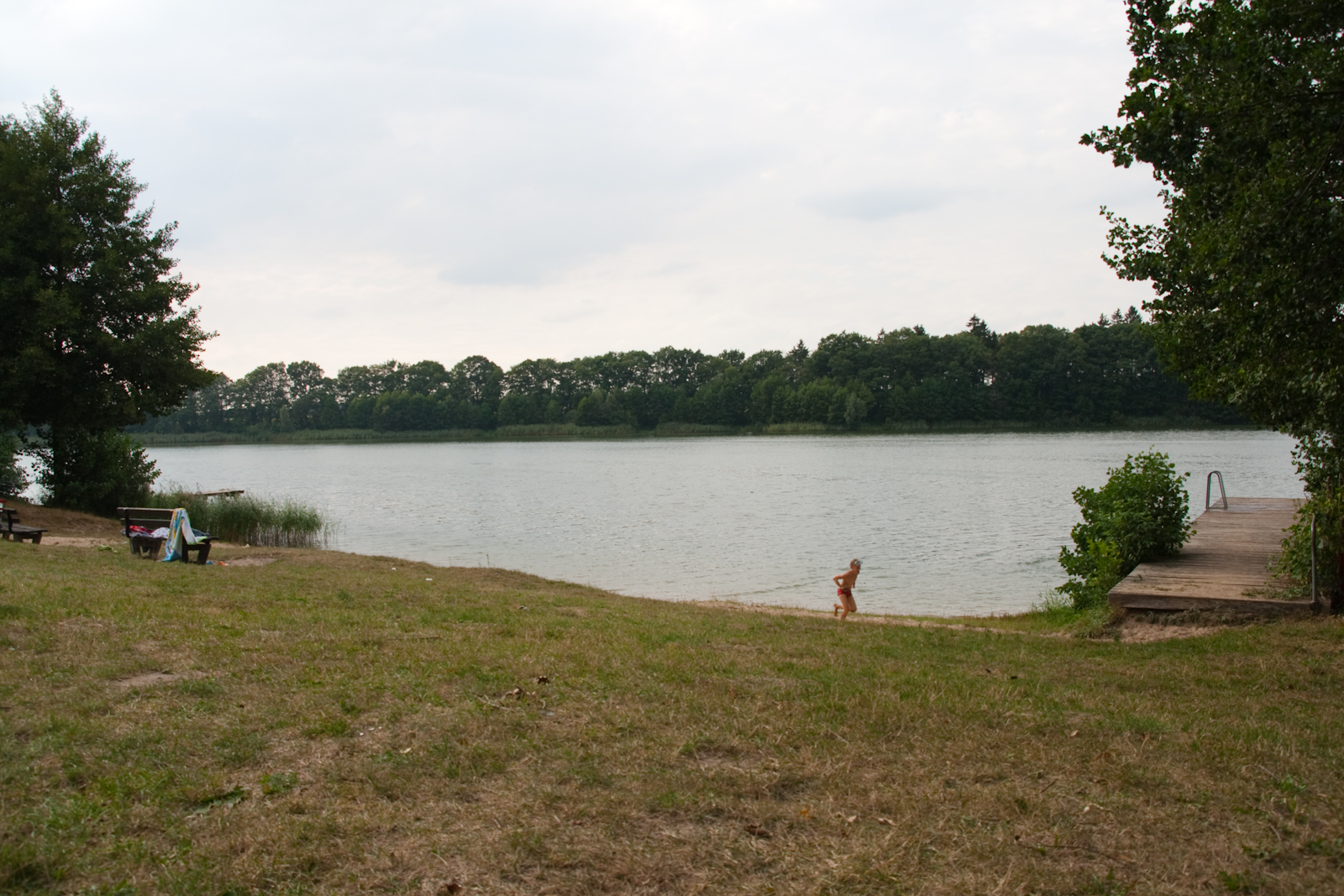 Badestelle mit Sicht von der Liegewiese auf den See. Links im Huntergrund befindet sich die kleine, Rechts die große Badebrücke. Auf beiden Berücken befand sich bis mindestens 2001 ein kleiner bzw. ein großer Sprungturm.